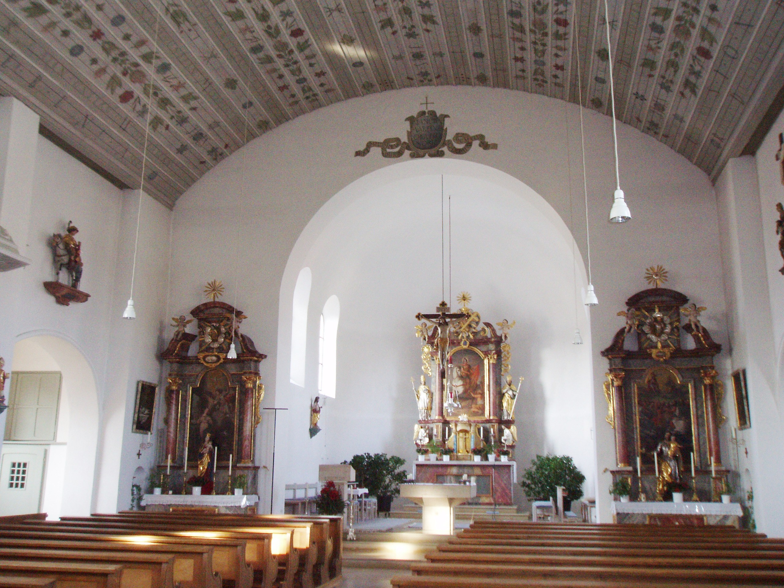 Egweil im Landkreis Eichstätt, Pfarrkirche St. Martin, Inneres